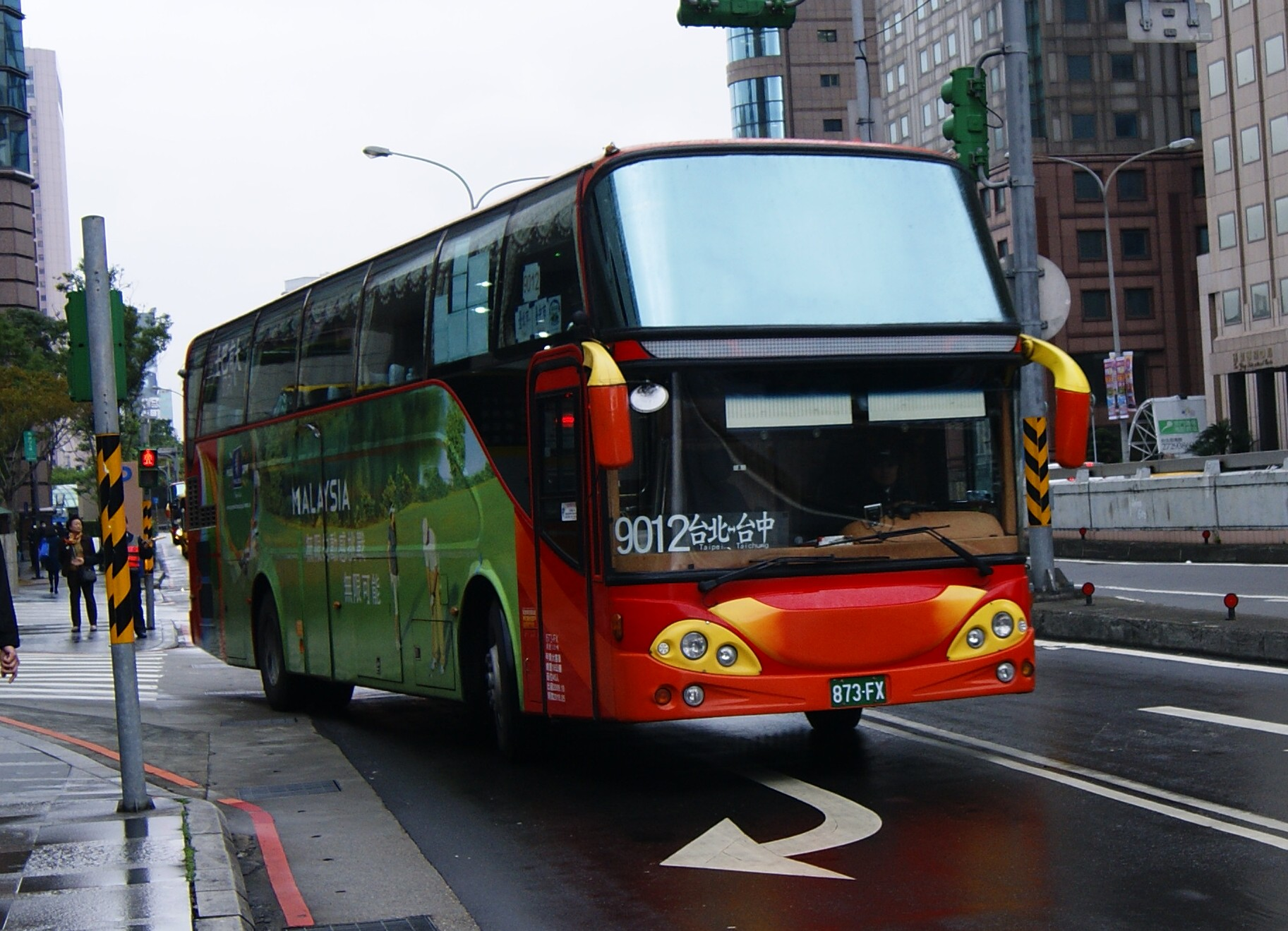 大有巴士2009 HINO RN8JSSA大吉車體 873-FX